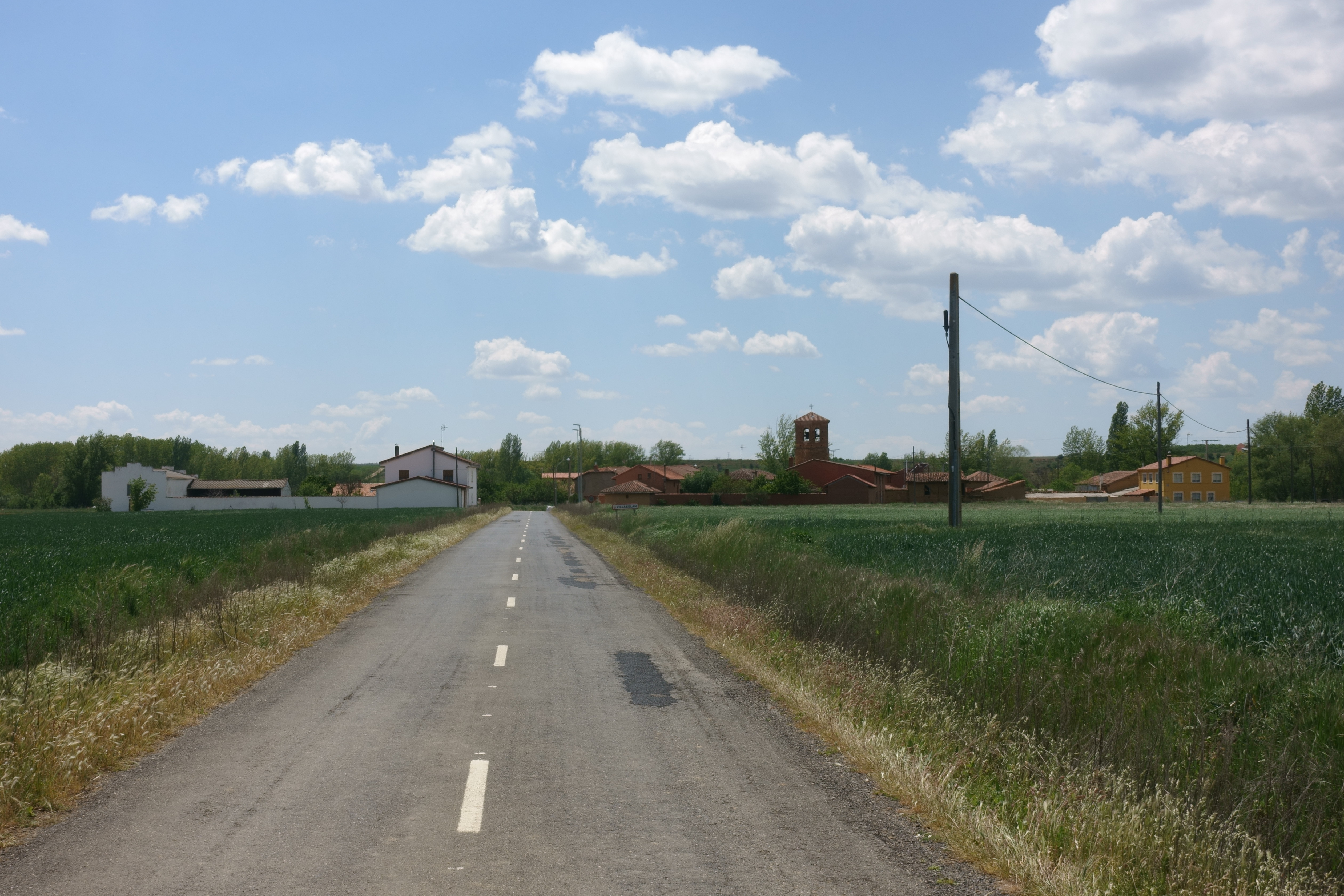 Vista de la entrada a Villaselán (León, España).